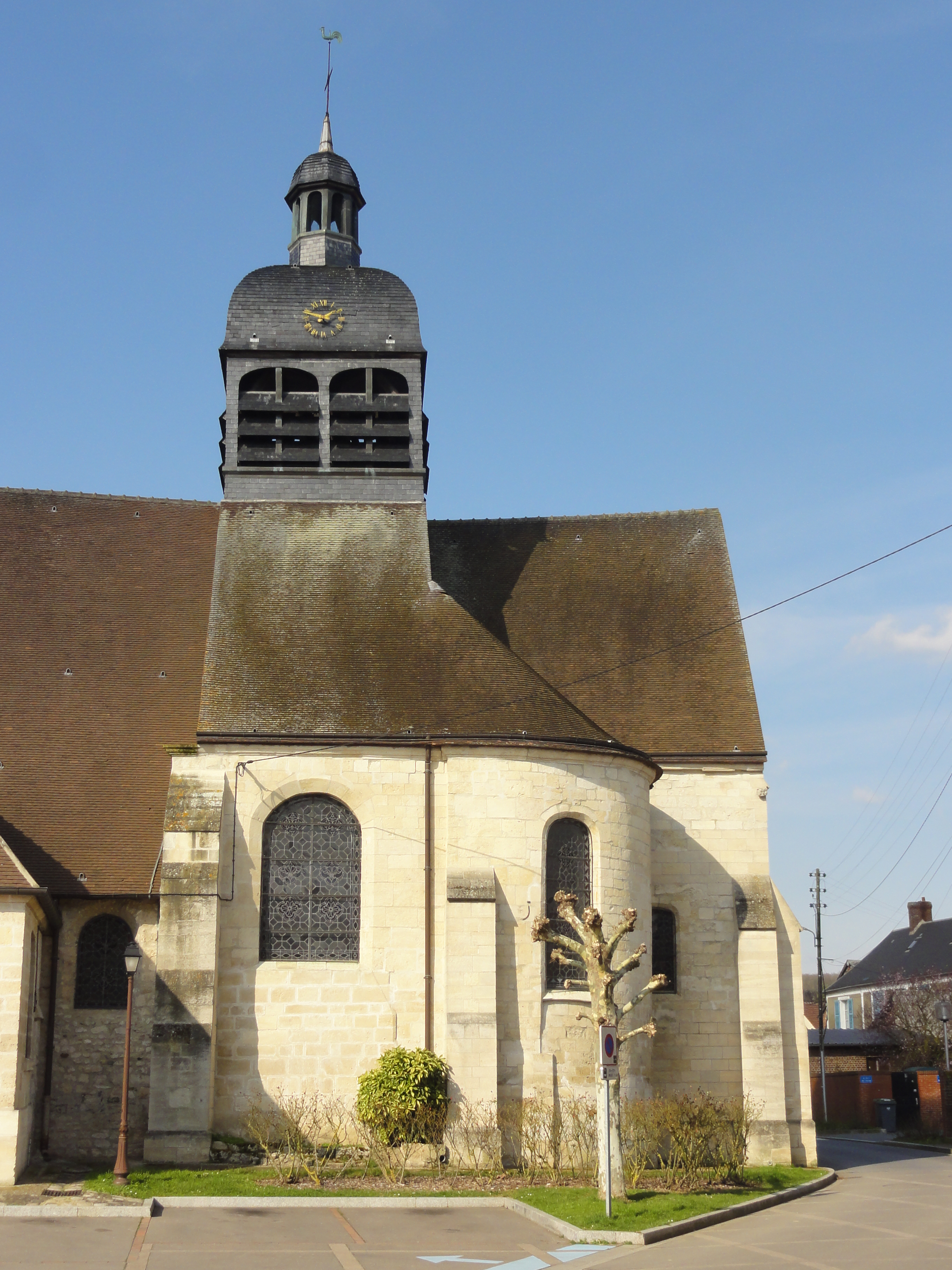 Église Saint-Denis de Bornel - voir titre.